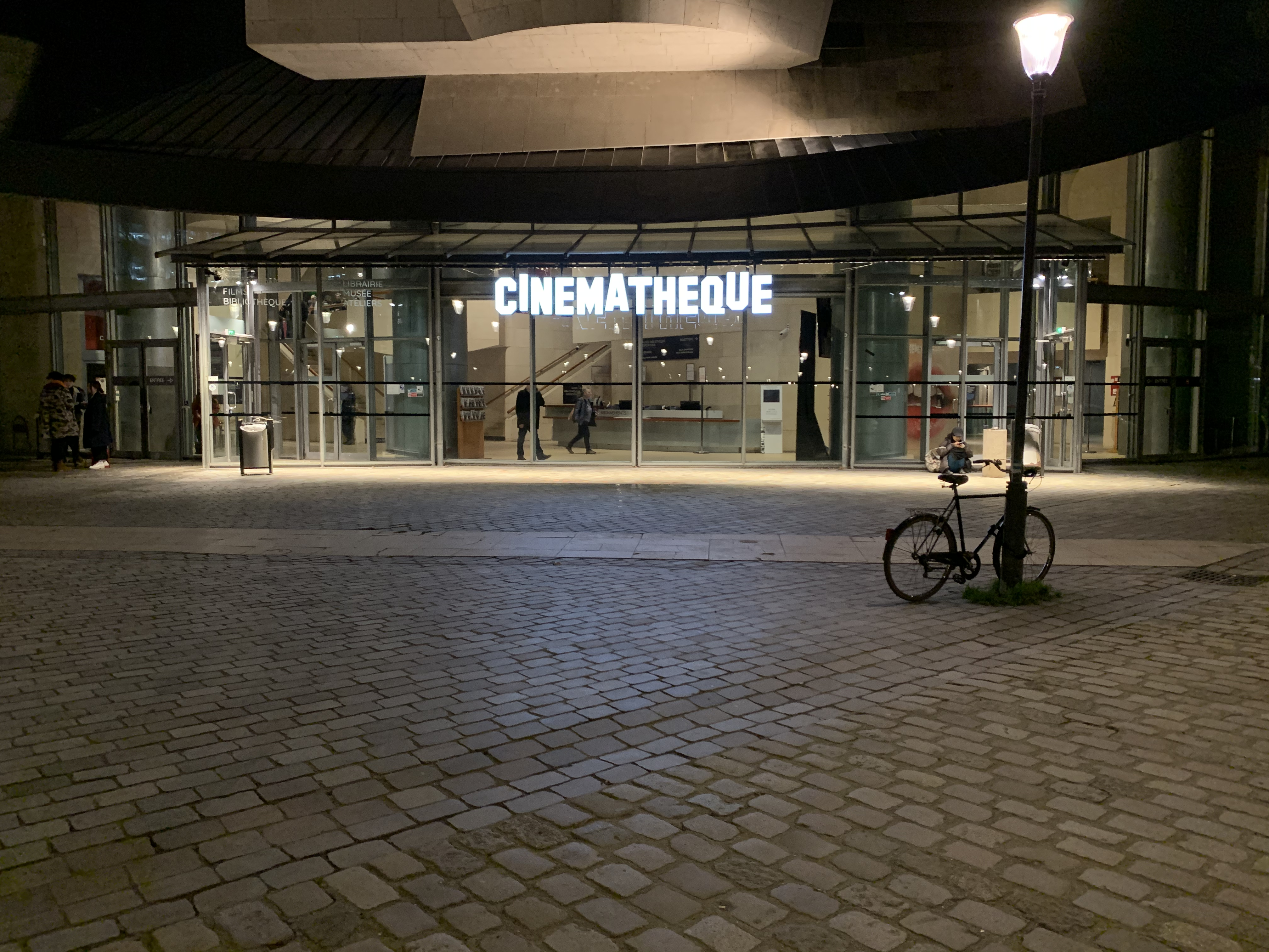 Cinémathèque française de nuit en janvier 2020.